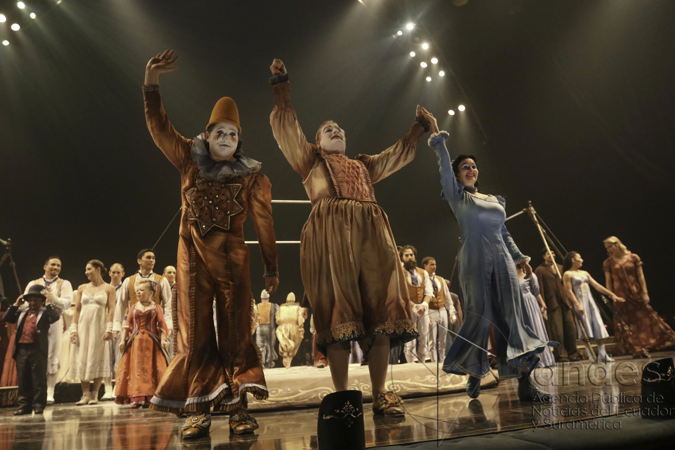 Quito, 18 nov (Andes).- El Circo del Sol presentó la obra Corteo’ que pone en escena a un total de 90 artistas, acróbatas y músicos, que representan la vida de un payaso que imagina su propio funeral. ANDES/Micaela Ayala V.